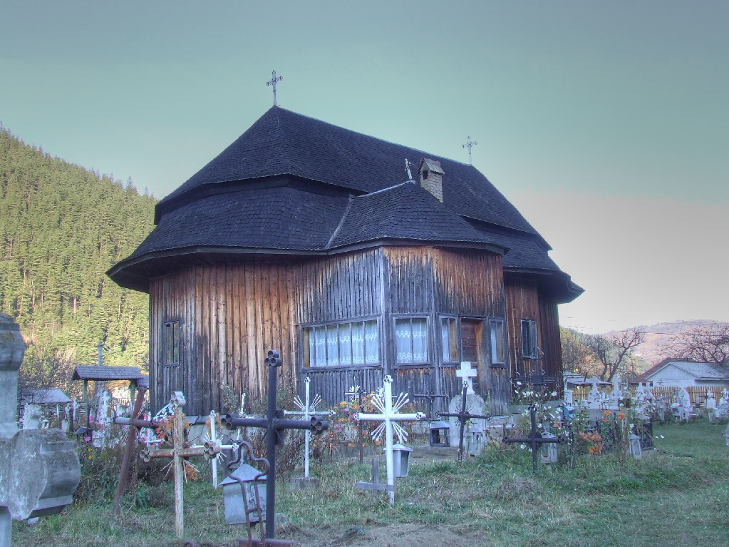 Biserica de lemn din Bistricioara, judeţul Neamţ.